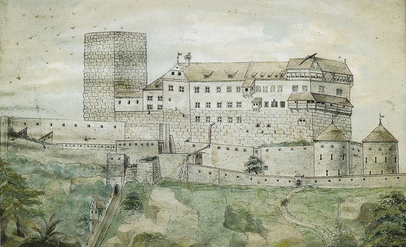 Ansicht der Hauptburg der Burg Pappenheim aus östlicher Richtung von Anfang des 18. Jahrhunderts. (Kolorierte Federzeichnung)